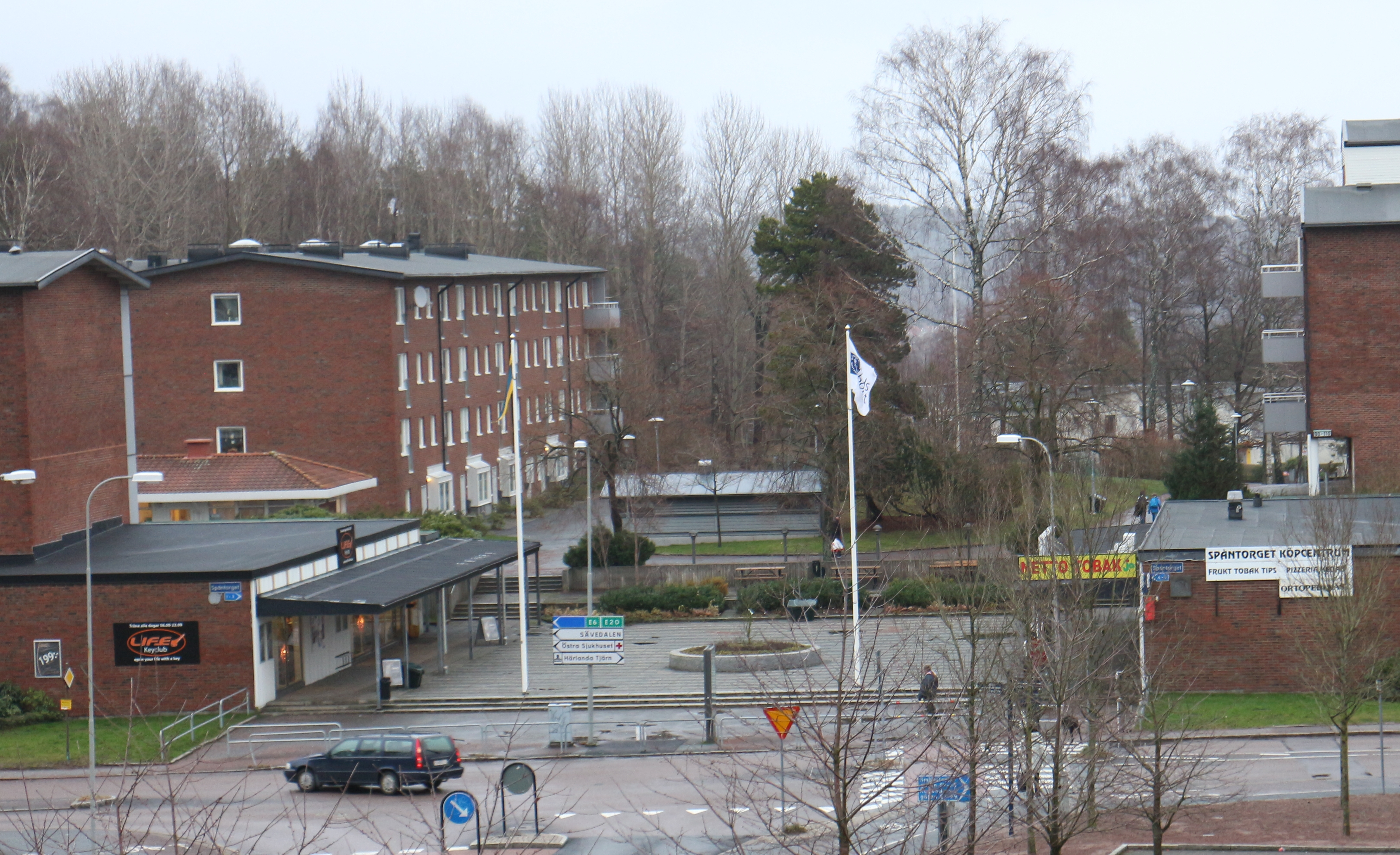 Spåntorget i primärområdet Björkekärr i stadsdelen Sävenäs, Göteborg.